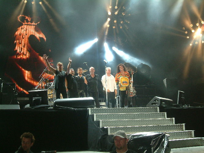 Queen + Paul Rodgers in Köln 6.7.2005